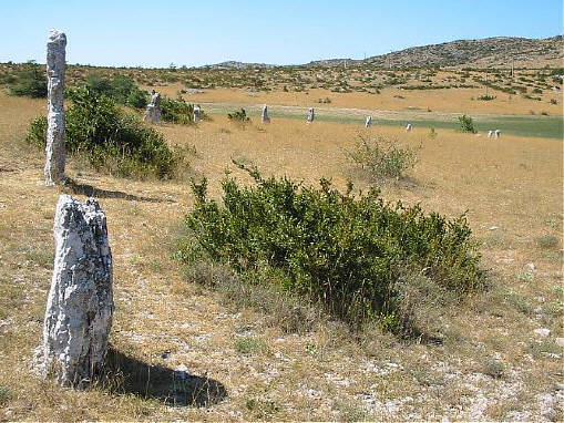 CROMLECH N°1 DE LA RIGALDERIE, CAUSSE DE BLANDAS, département du GARD, région LANGUEDOC, FRANCE Ce cercle de plus d'une cinquantaine de pierres dressées (ou menhirs) a été érigé à l'époque préhistorique (environ 3000 avant J-C). Sa fonction initiale n'est pas connue avec certitude. [1] Photo : Bruno MARC Licence : GFDL Bruno MARC